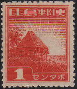 フィリピンを占領した日本軍が発行した1センタボ切手。ゆえに日本語で「比島郵便」と表記されている。